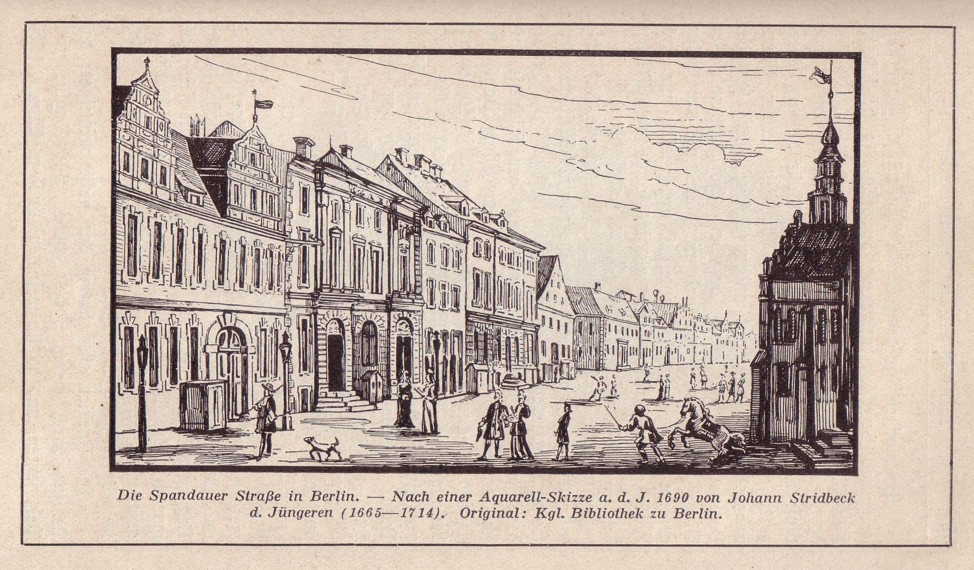 Stich der Spandauer Straße in Berlin